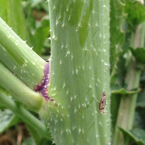 base hérissée et velue d'une moutarde noire (gros plan).